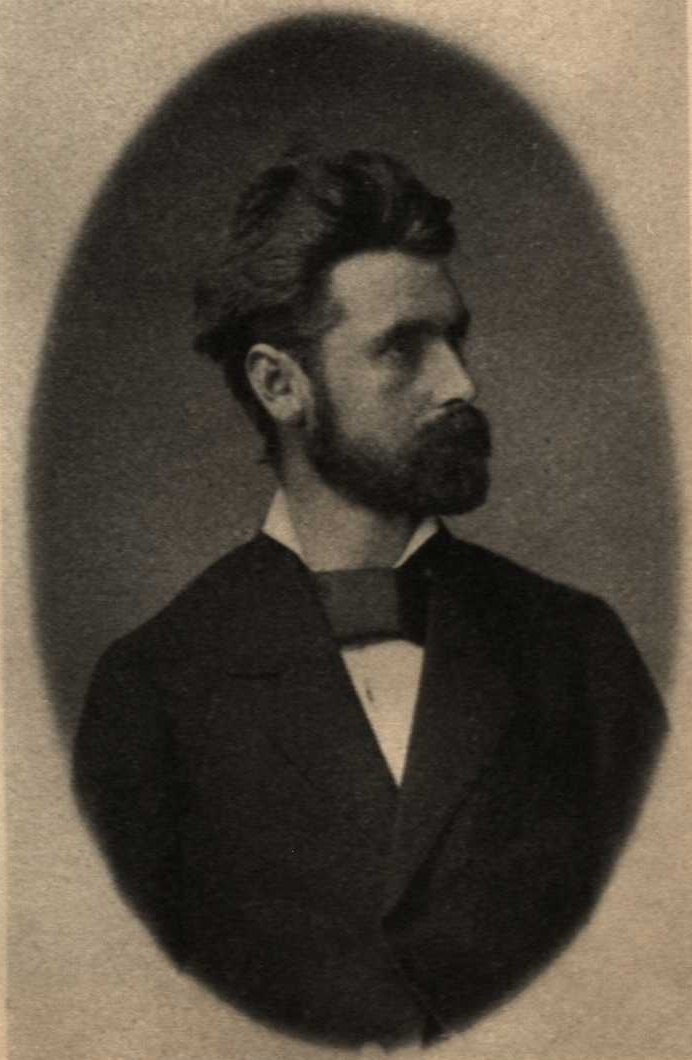 Friedrich Bechtel (1855–1924), deutscher Spachwissenschaftler